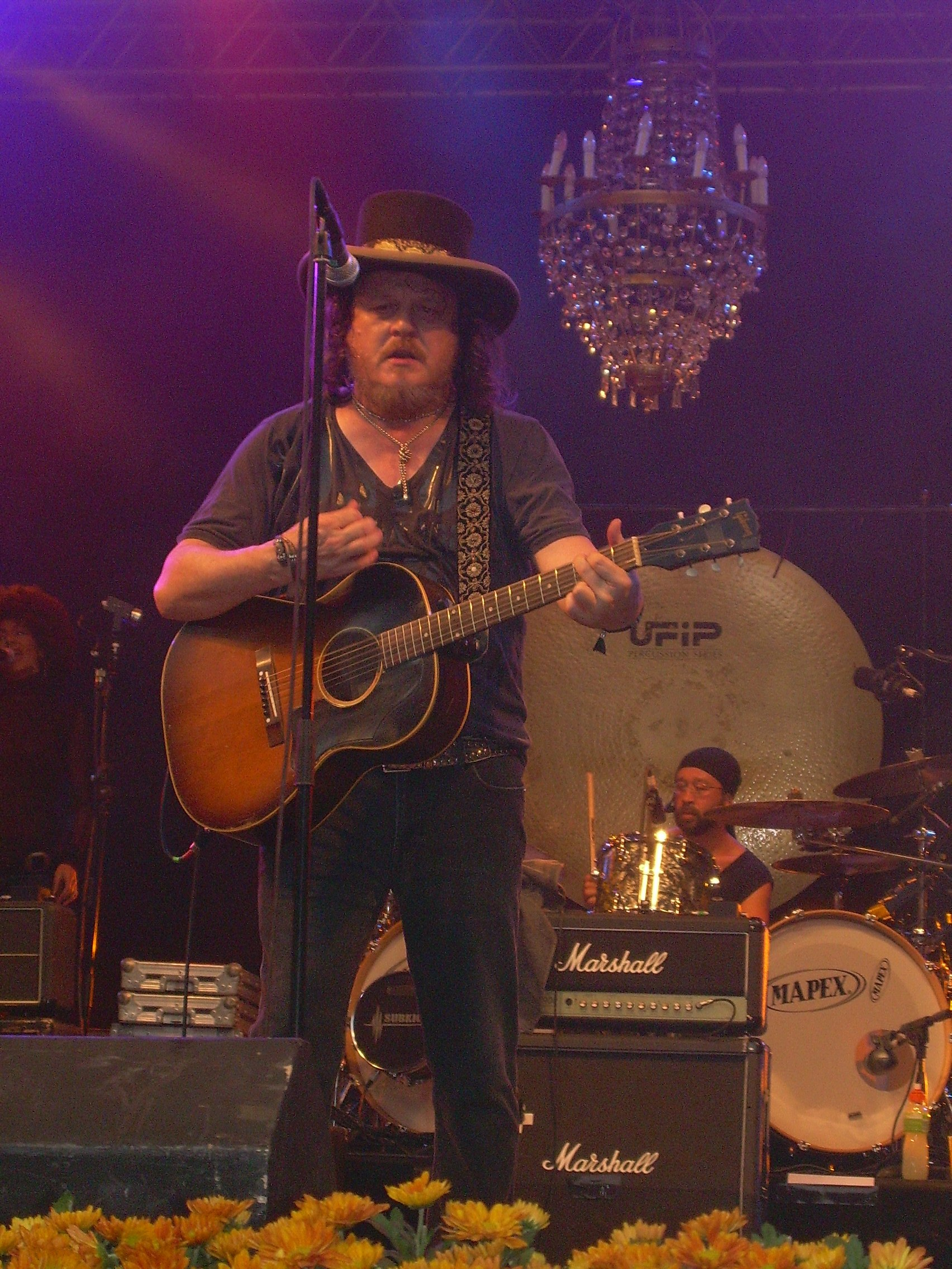 Italian singer Zucchero live at Skanderborg Festival 2007, Denmark